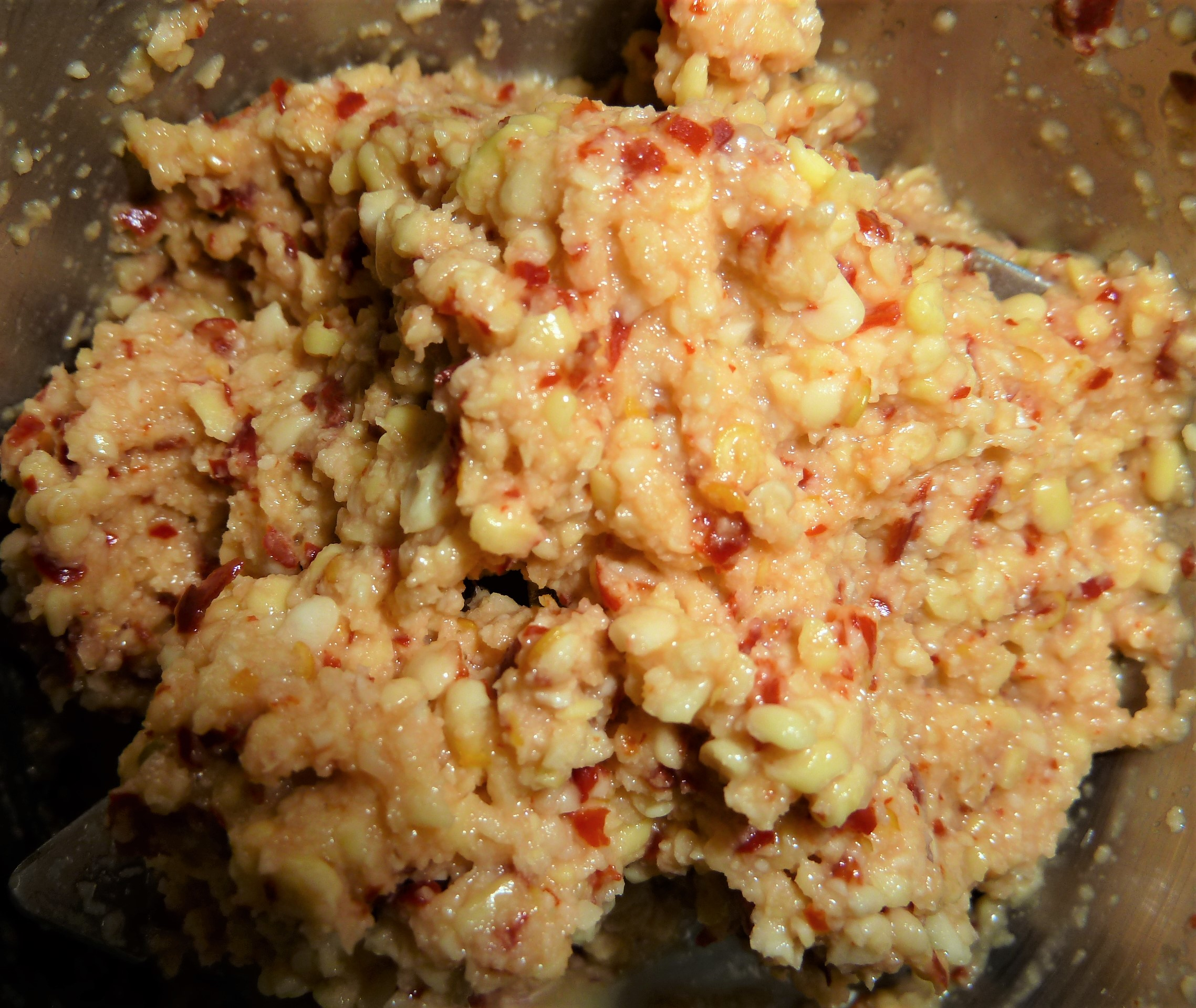 పెసరపప్పు పచ్చడి